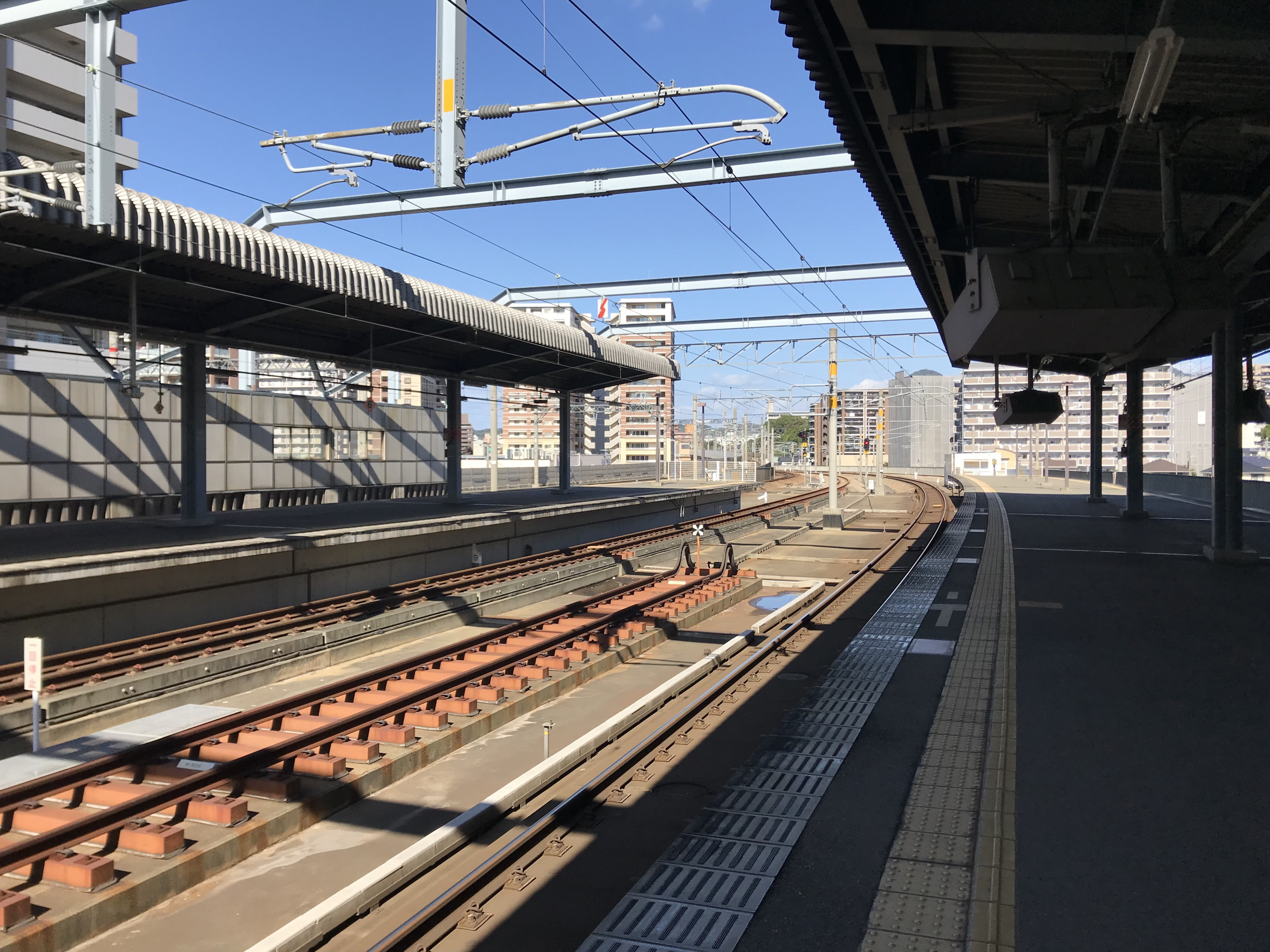 千早駅のホーム(奥は香椎方面)